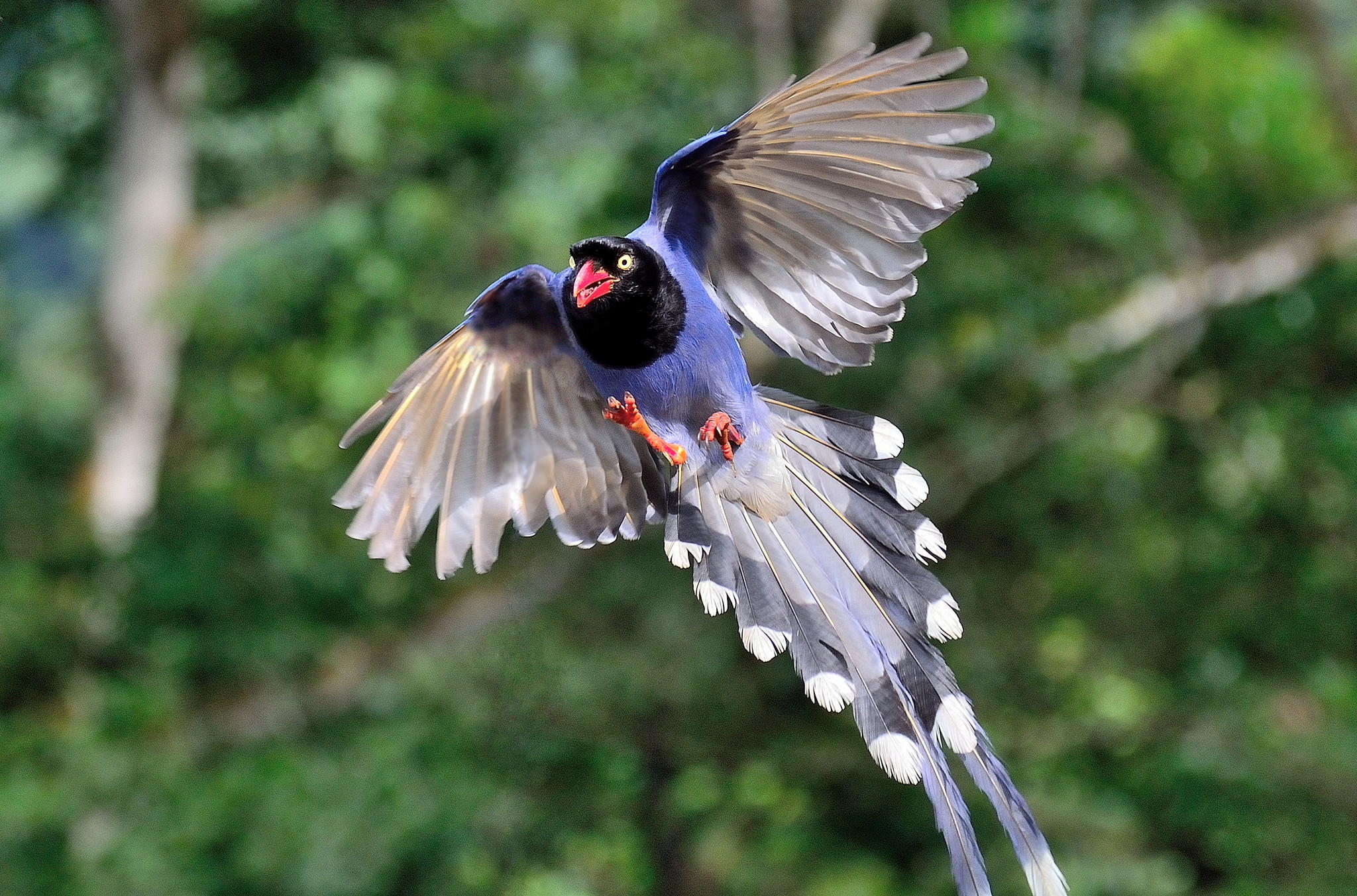 Толстоклювая лазоревая сорока